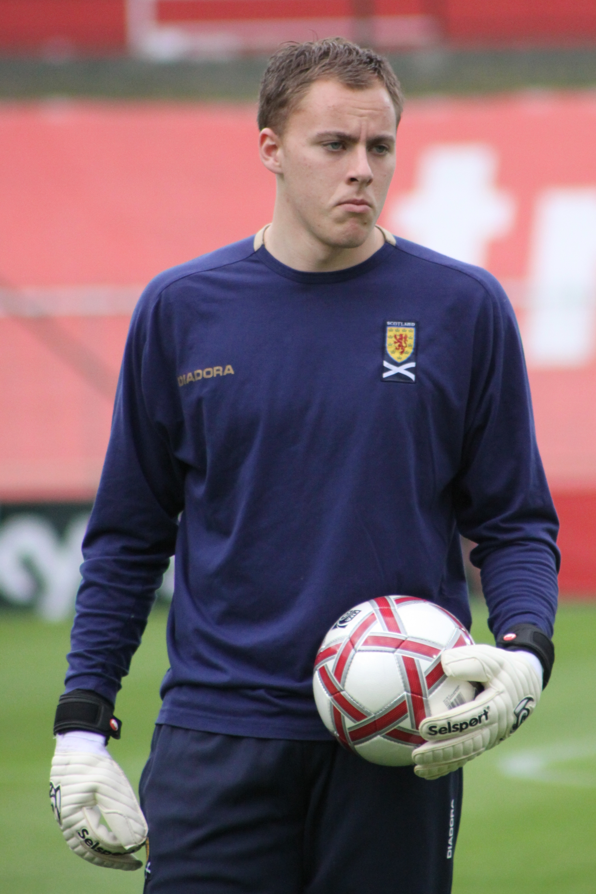 Scott Gallacher (Glasgow Rangers) - Schottische Fußballnationalmannschaft (U-21-Männer) Scott Gallacher (Rangers F.C.) - Scotland national under-21 football team — (2)